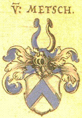 Wappen der Familie von Metsch nach Siebmachers Wappenbuch